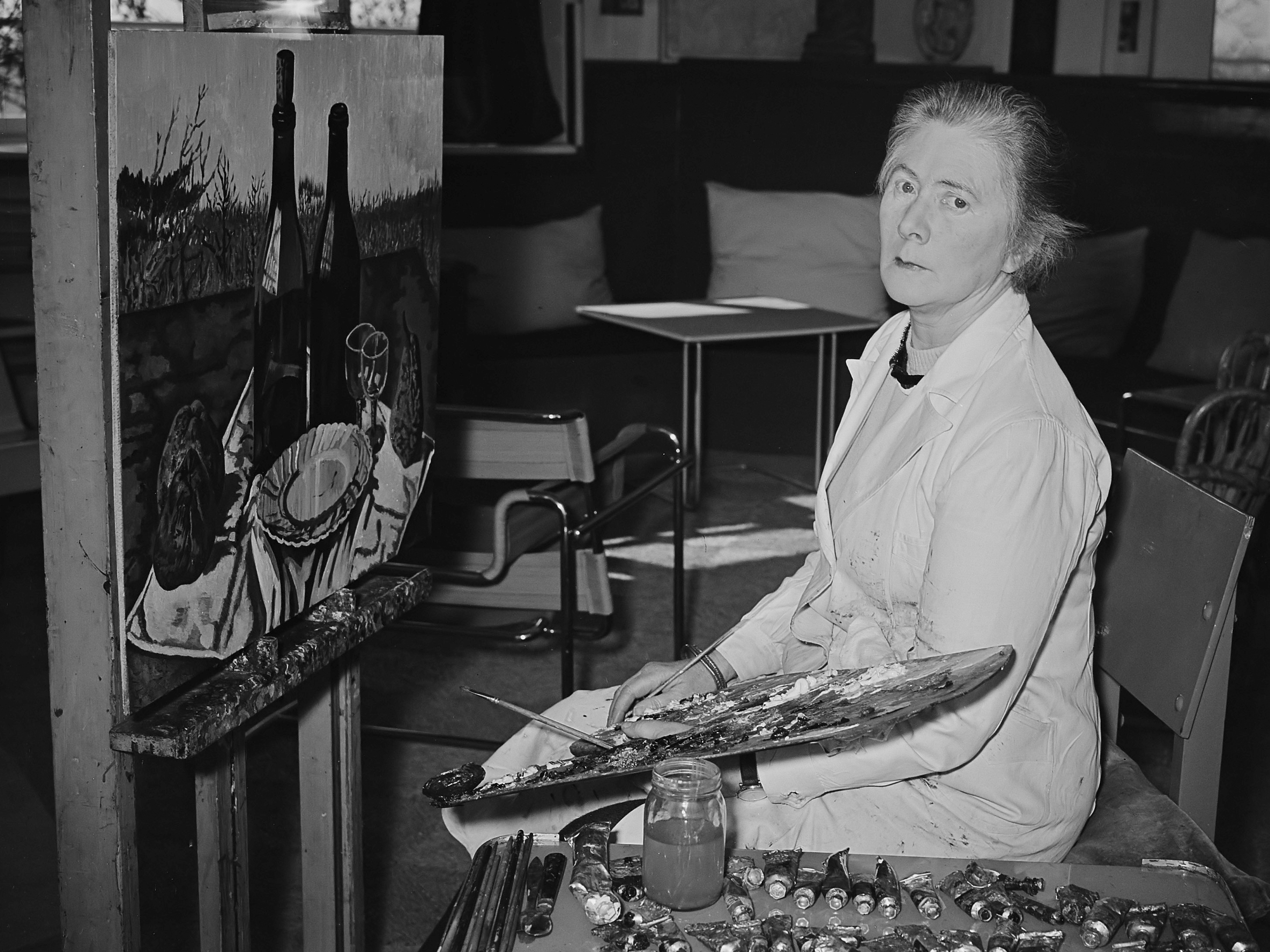 Charley Toorop wordt op 24 maart 60 jaar 3 maart 1951